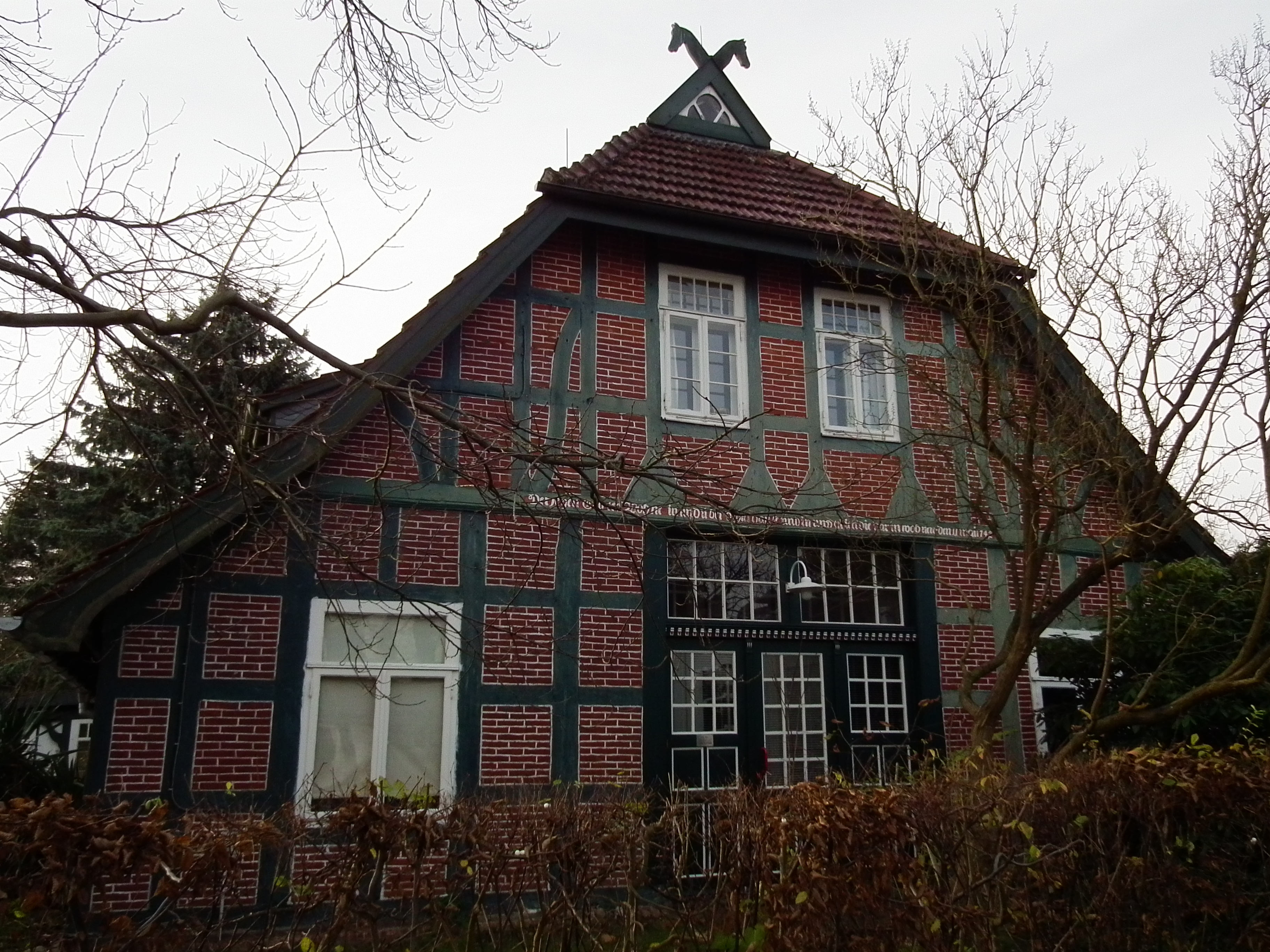 Fachwerk-Klinker-Bau im Bremer Stadtteil Lesum (Deutschland)